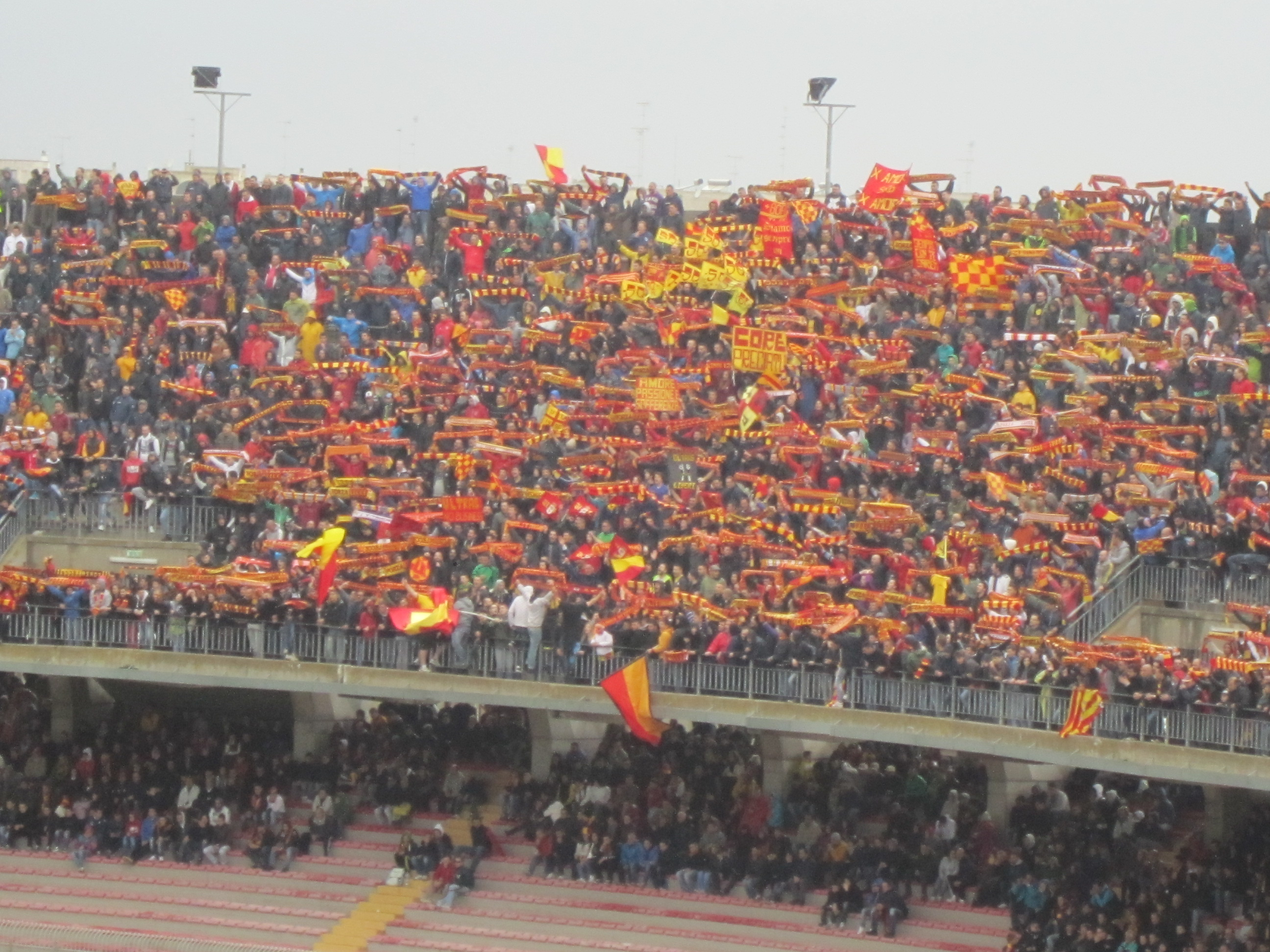 U.S. Lecce supporters, Curva Nord, Lecce - A.S. Roma 4 - 2, Stadio Via del Mare, April 7th, 2012